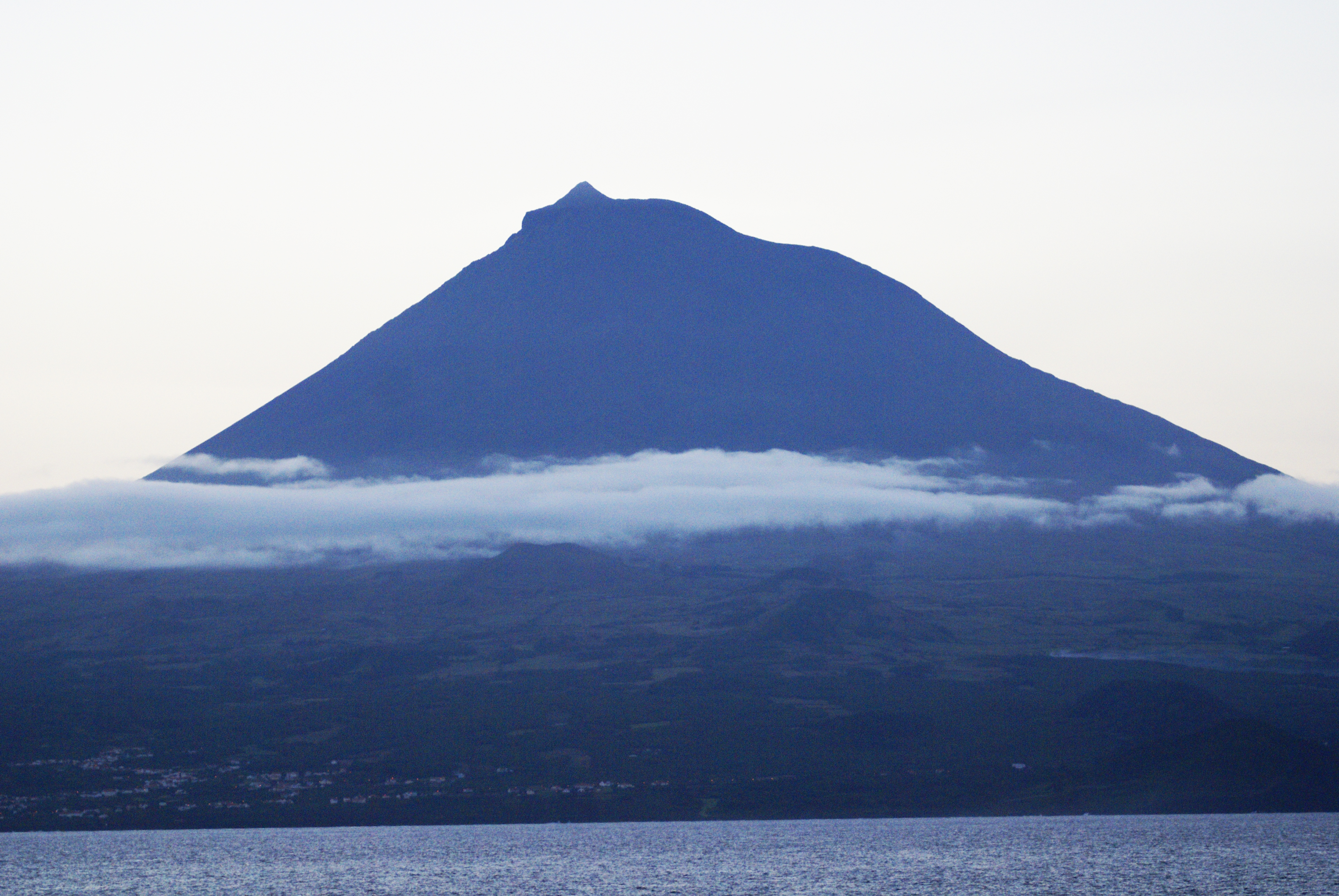 Montanha do Pico, aspectos, ilha do Pico, Açores, Portugal